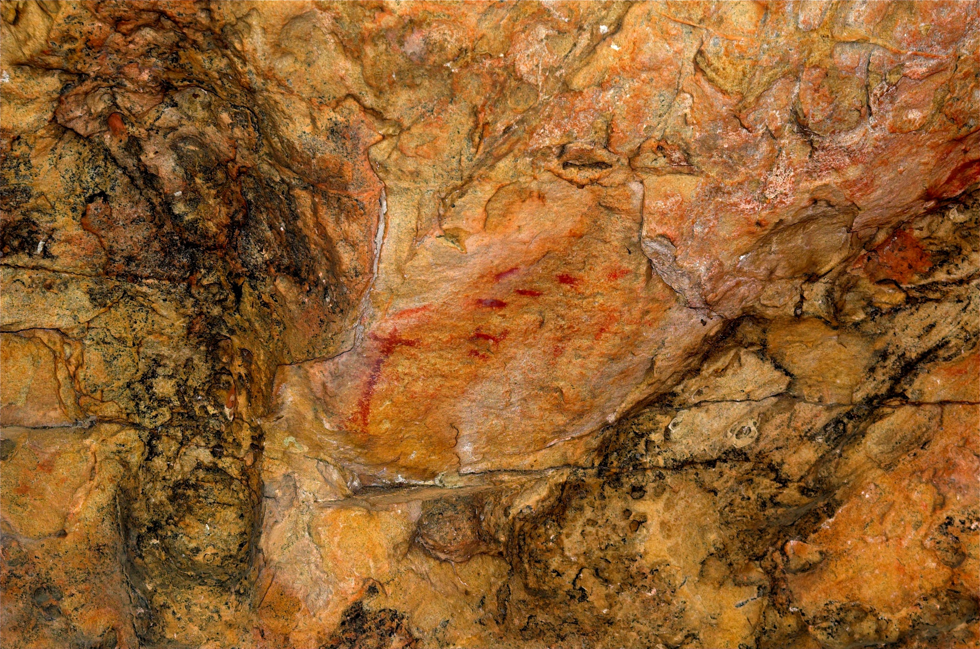 Pinturas rupestres de las Piedras de Cabrera (Casabermeja).